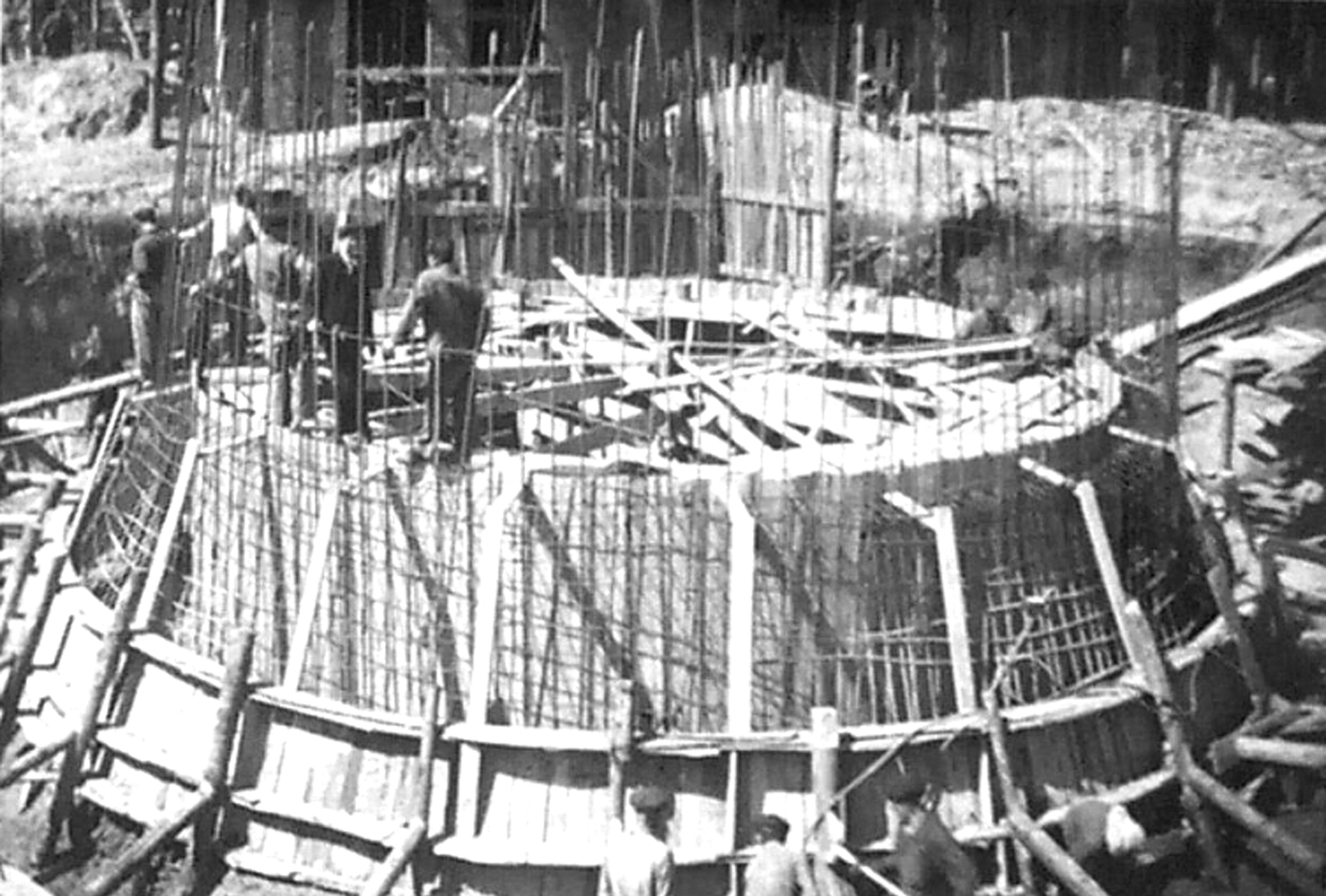 Строительство градирни Тамбовской ТЭЦ